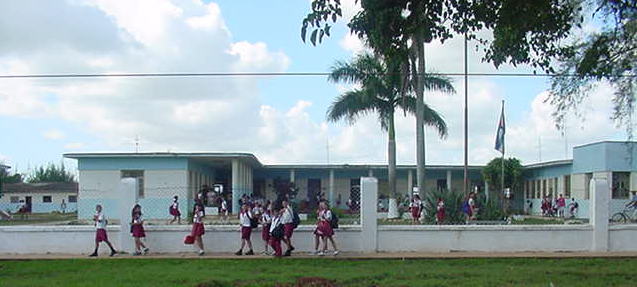 Escuela Primaria Rogelio Perea Suarez en Melena del Sur